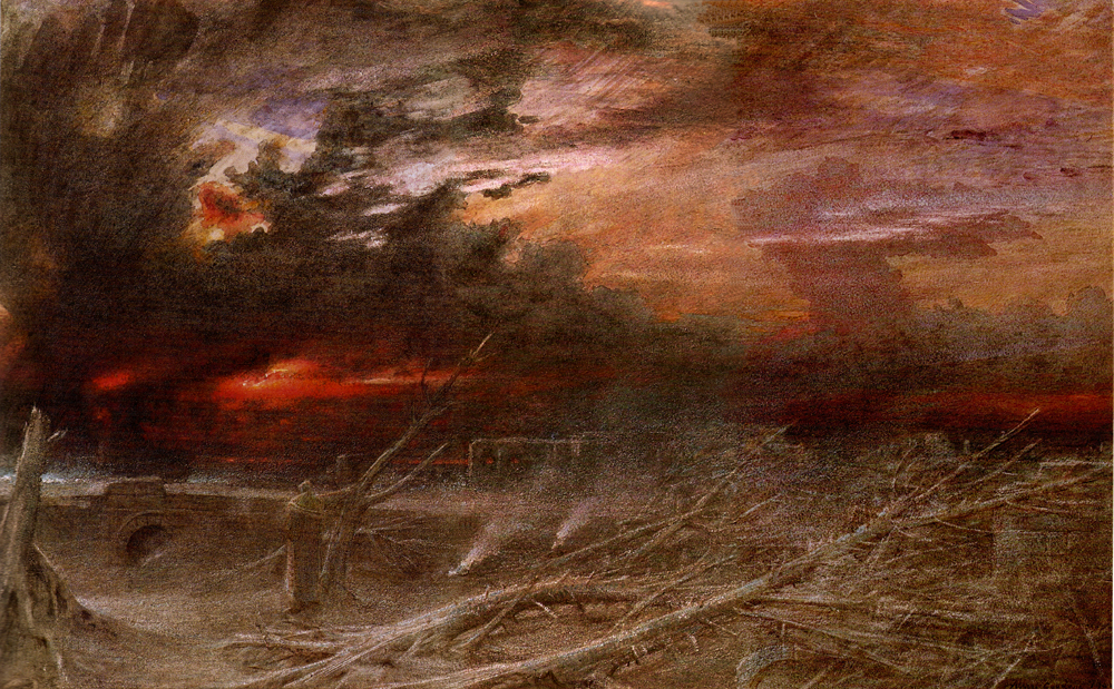 Apokalipsa